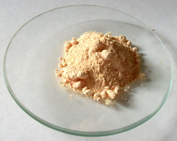 PbO